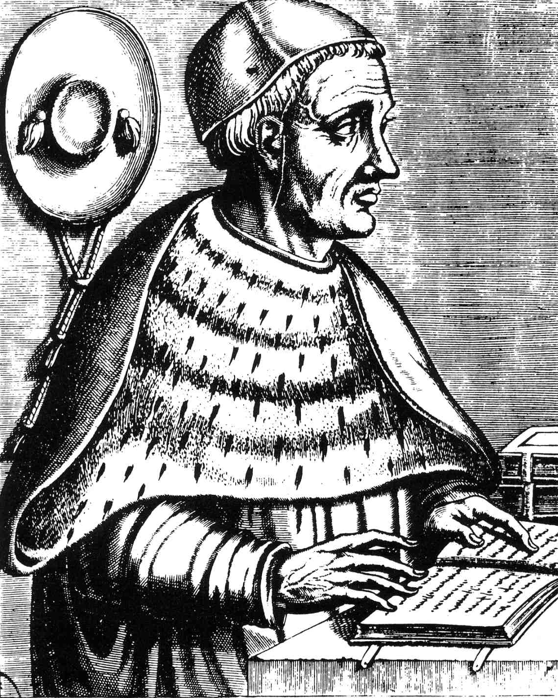 Cardinal Pierre d'Ailly, archevêque de Cambrai, grand prévôt de Saint-Dié